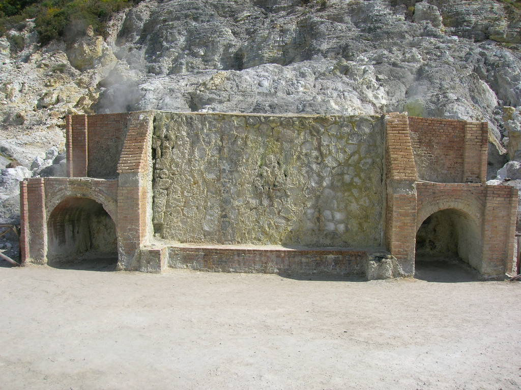 La struttura delle Stufe Antiche